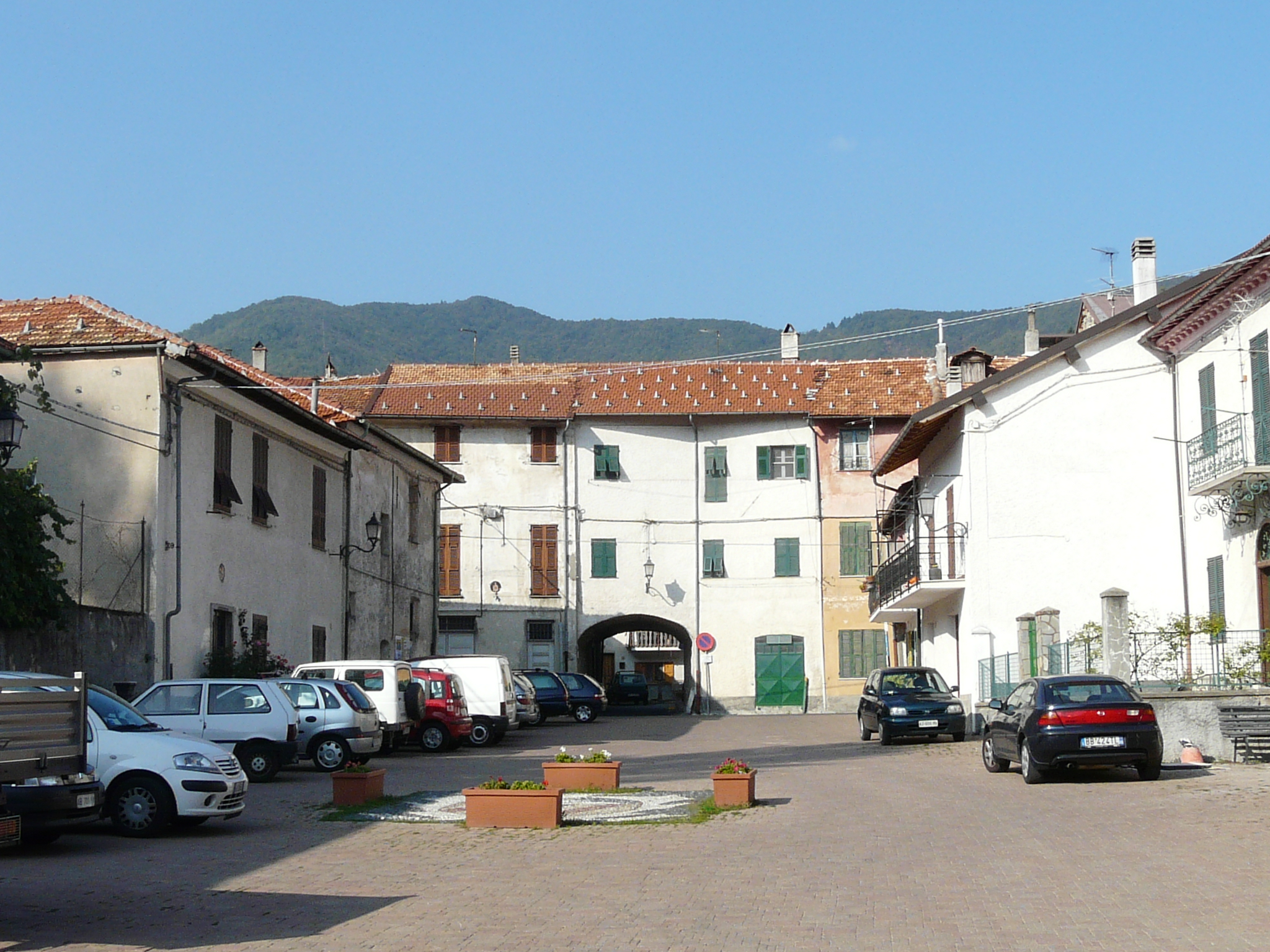 Piazza del centro storico di Calizzano, Liguria, Italia